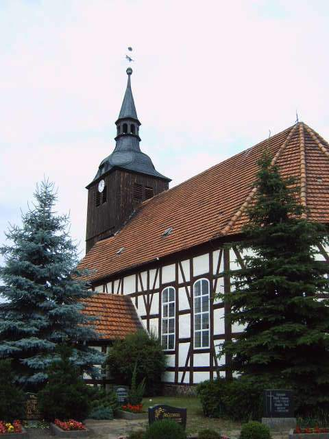 Dorfkirche in Schlepzig, Land Brandenburg, Deutschland Bild aufgenommen am 28.6.2006 von Olaf Meister